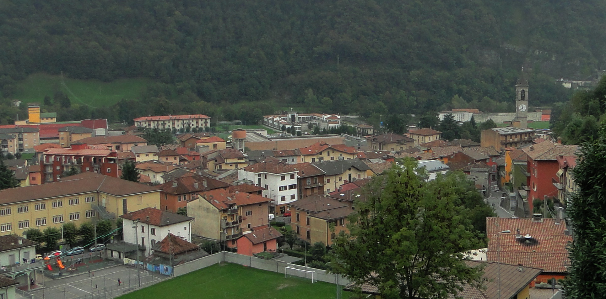 Fiorano al Serio, Bergamo, Italia